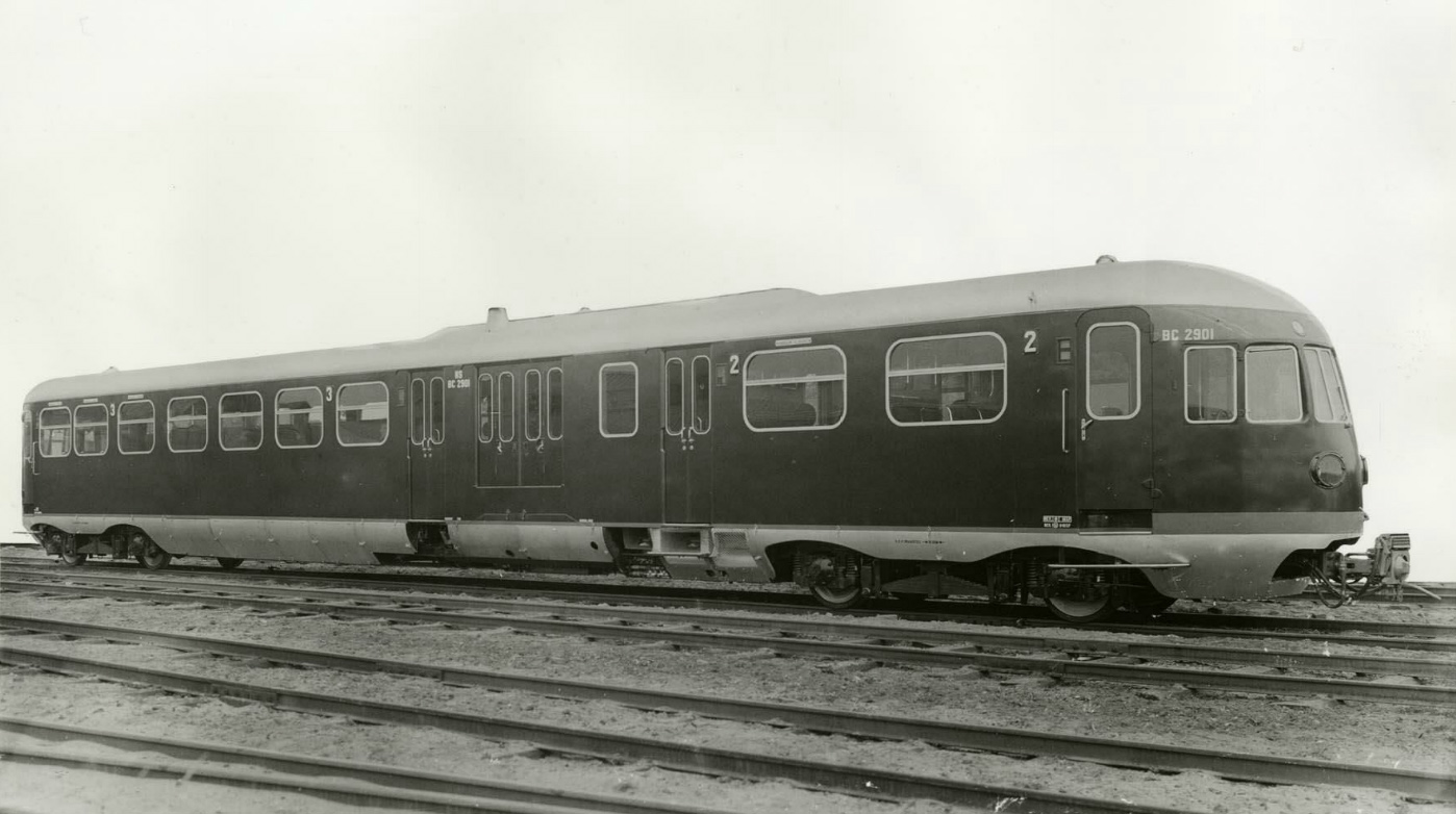 Foto van motorwagen BC 2901 van de Nederlandsche Spoorwegen op het terrein van Werkspoor. Foto gemaakt door Werkspoor. Het object, uitgegeven door een instantie, is vanaf 70 jaar na publicatie niet meer auteursrechtelijk beschermd.